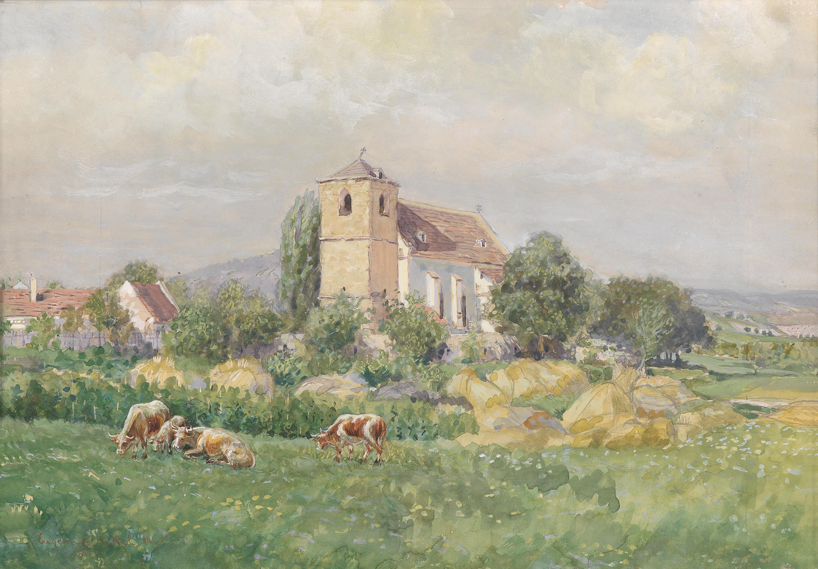 Kirche in Staatz